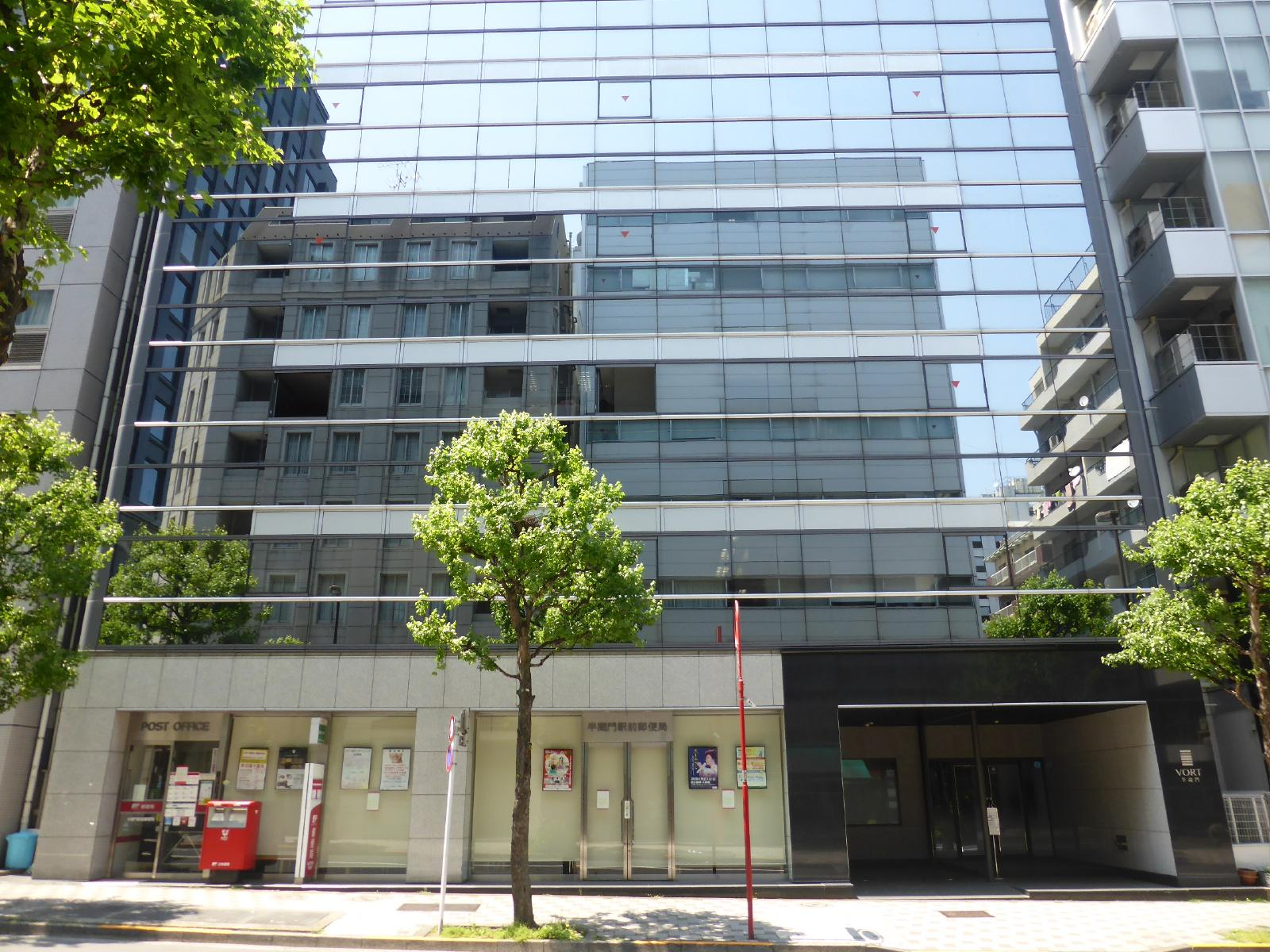 駐日パレスチナ代表部が入居するオフィスビル